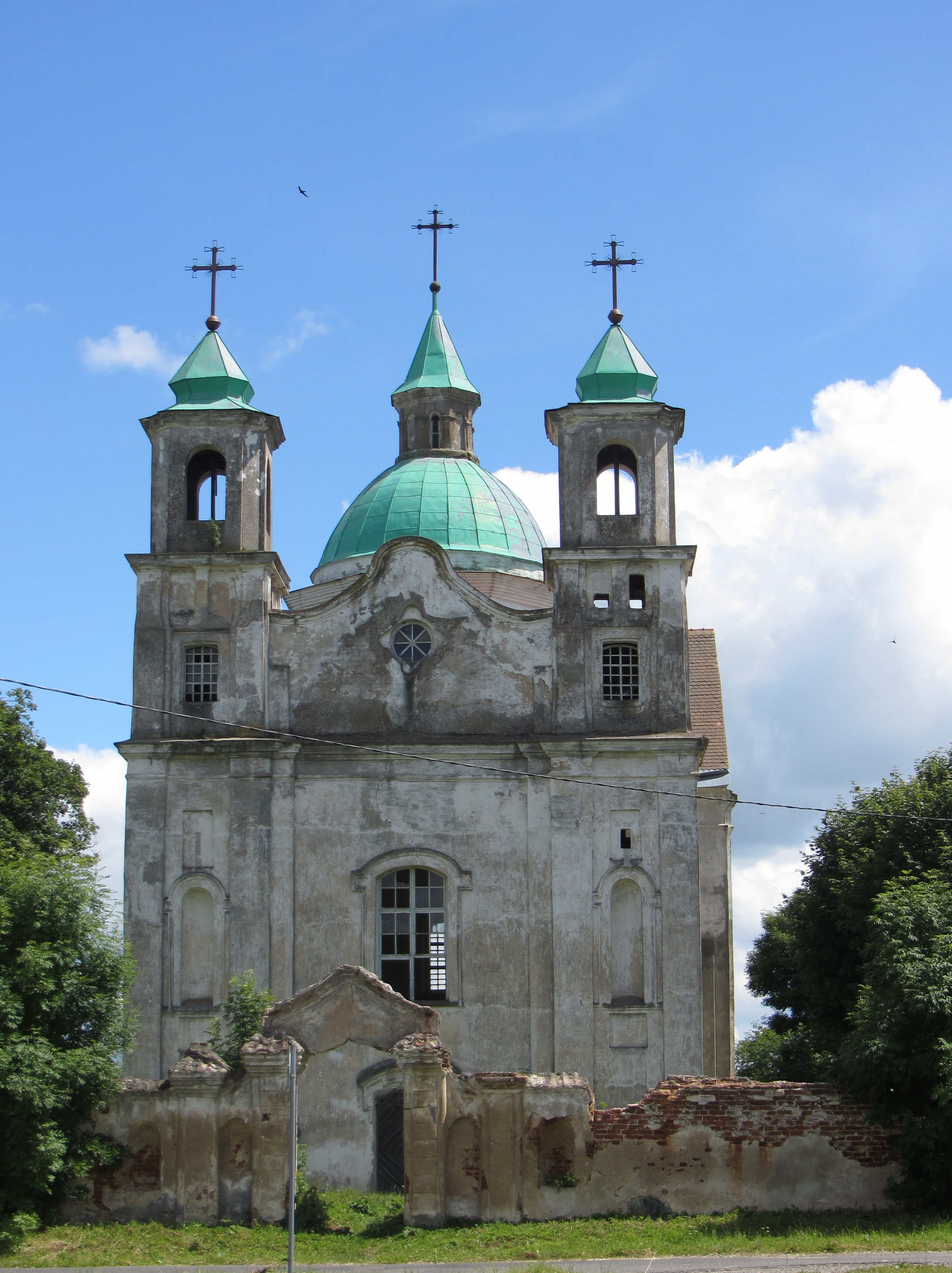 Беларуская (тарашкевіца): Касьцёл Найсьвяцейшай Тройцы, Беніца